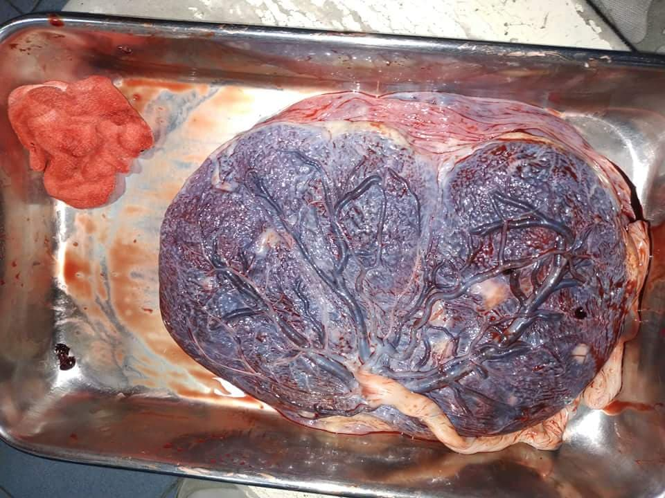 Maternal side of a whole human placenta, just after birth.